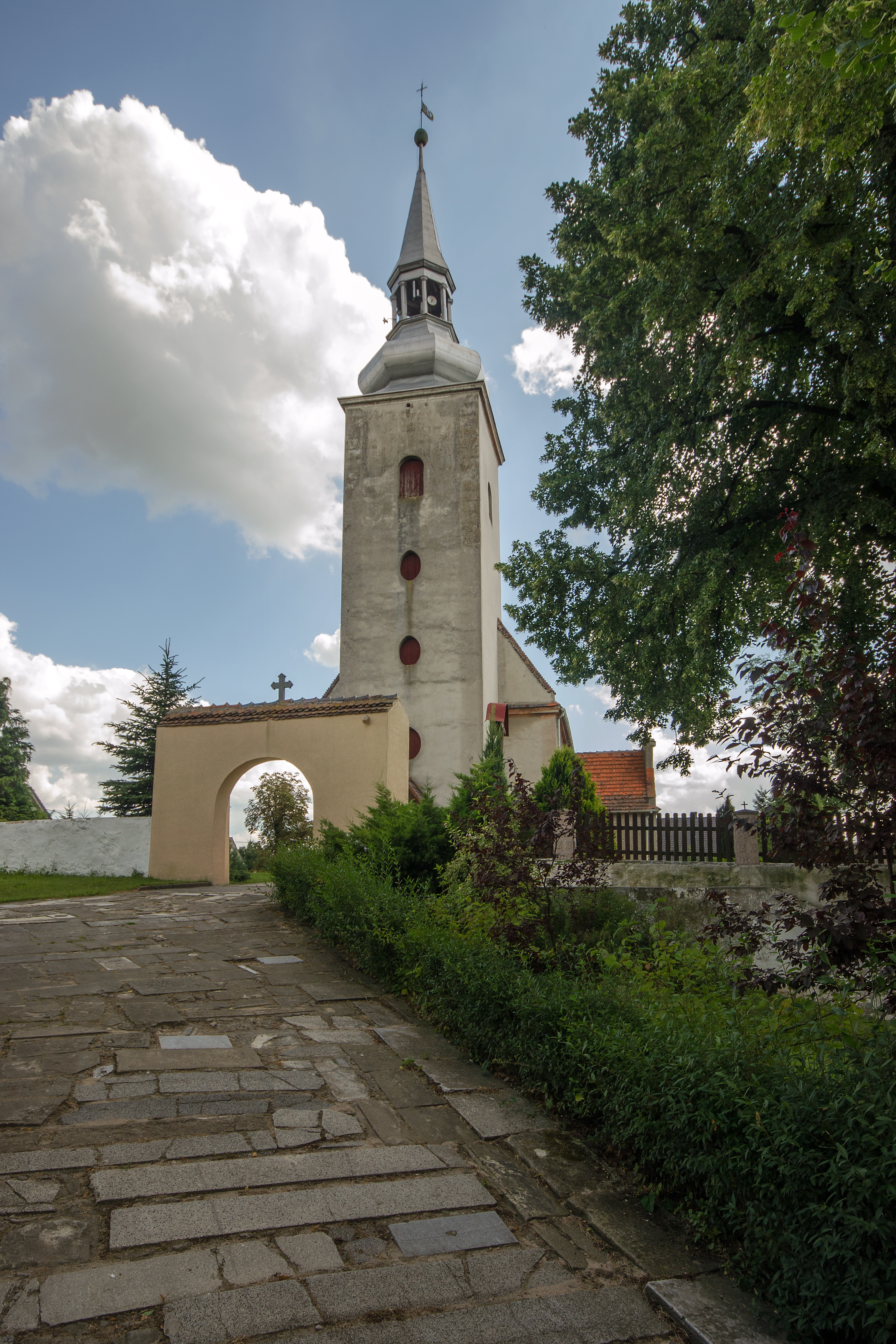 Różyna, kościół fil. p.w. św. Mikołaja, XVIII